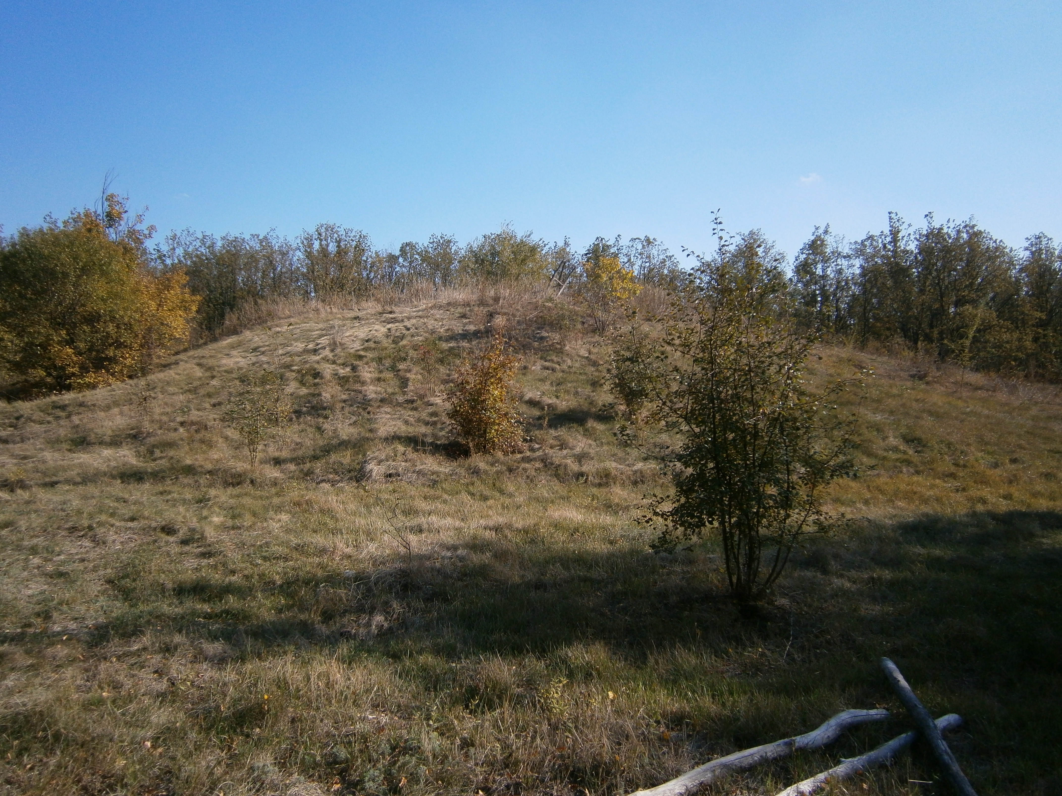 Головний курган могильника курганного “Могила Товста” (4 кургани), Кривий Ріг, селище рудника ім. Р. Люксембург, на захід за провальною зоною ш. Гвардійська та масивом покинутих дач, більший курган в лісонасадженні. Інші знайти не вдалось.